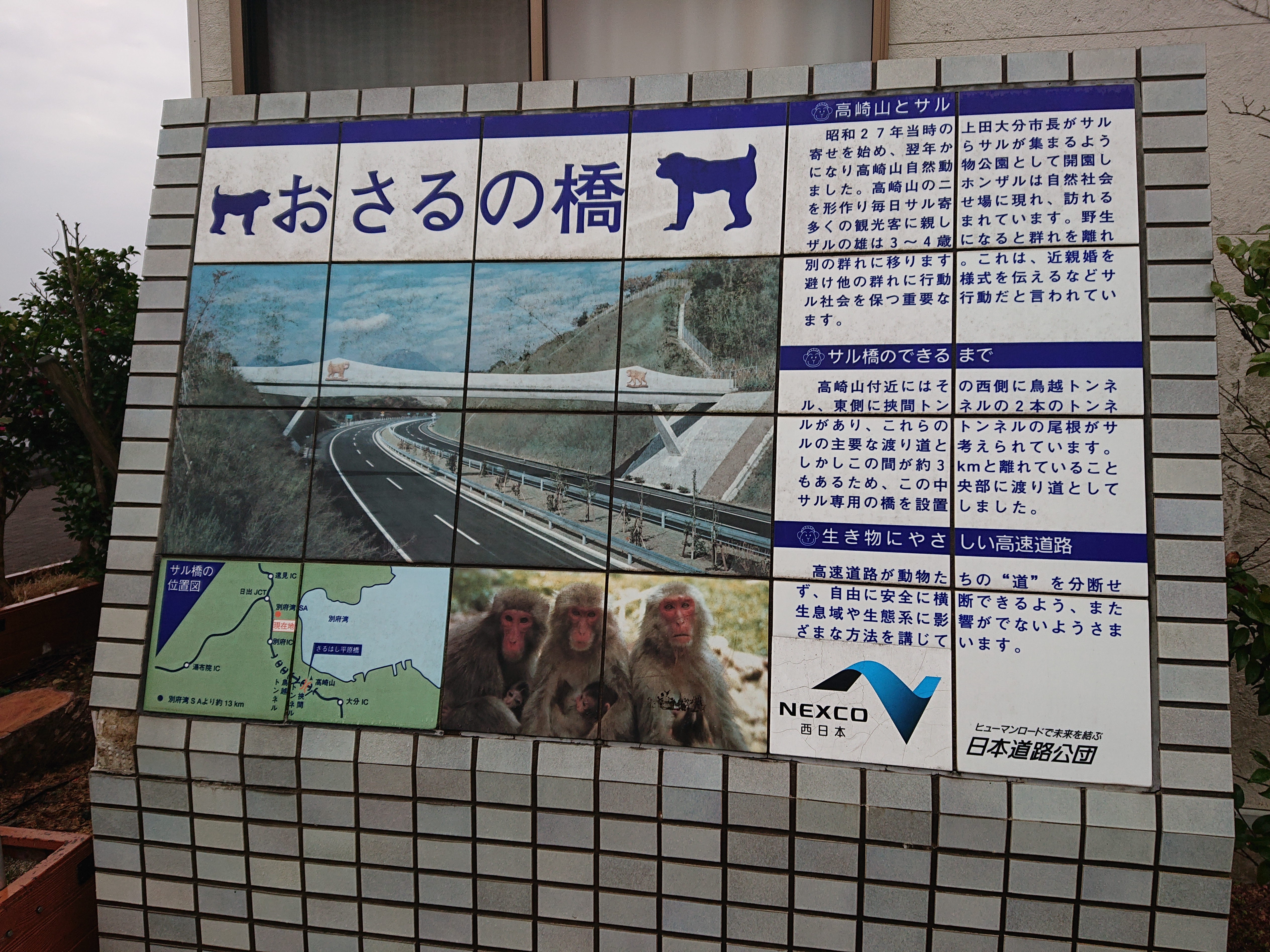 別府サービスエリアに設置された「おさるの橋」に関する解説。